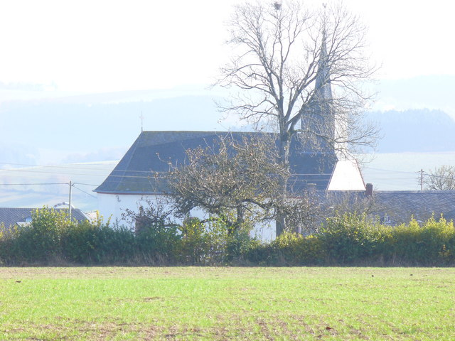 Pfarrkirche, Harspelt